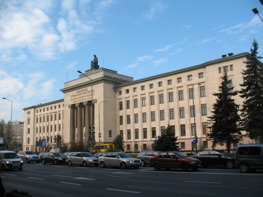 Будинок гірничо-металургійної академії в Кракові. Фото І. Парнікози, 2012 р.